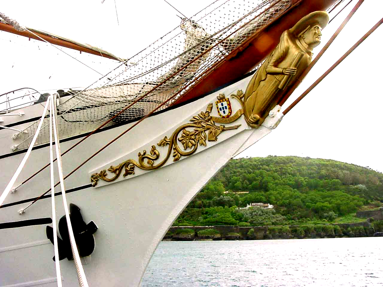 Sagres, pormenor da proa, o Infante D. Henrique. Quando da sua passagem pelo Porto de Pipas, Angra do Heroísmo, ilha Terceira, Açores